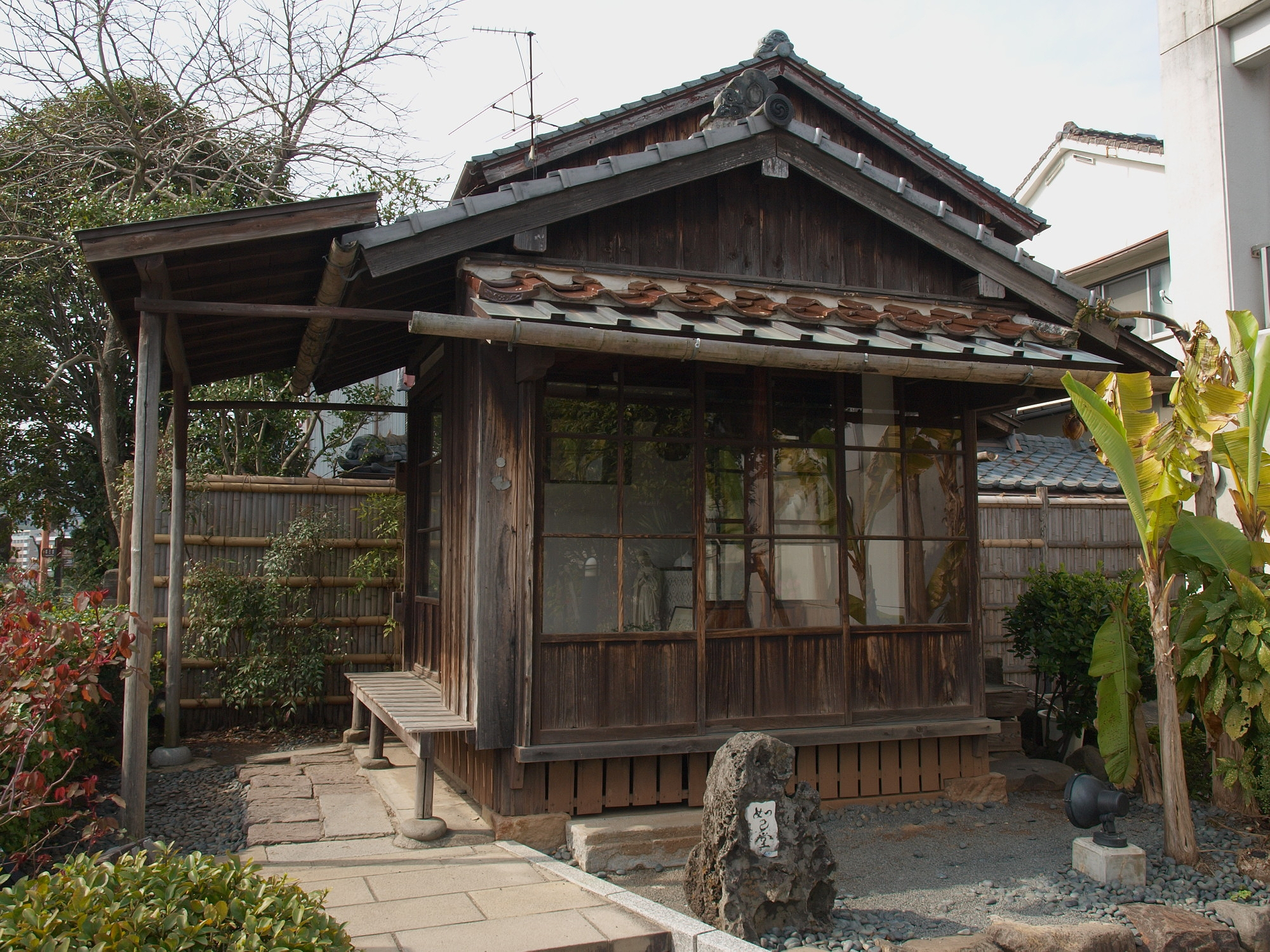 長崎県長崎市にある如己堂